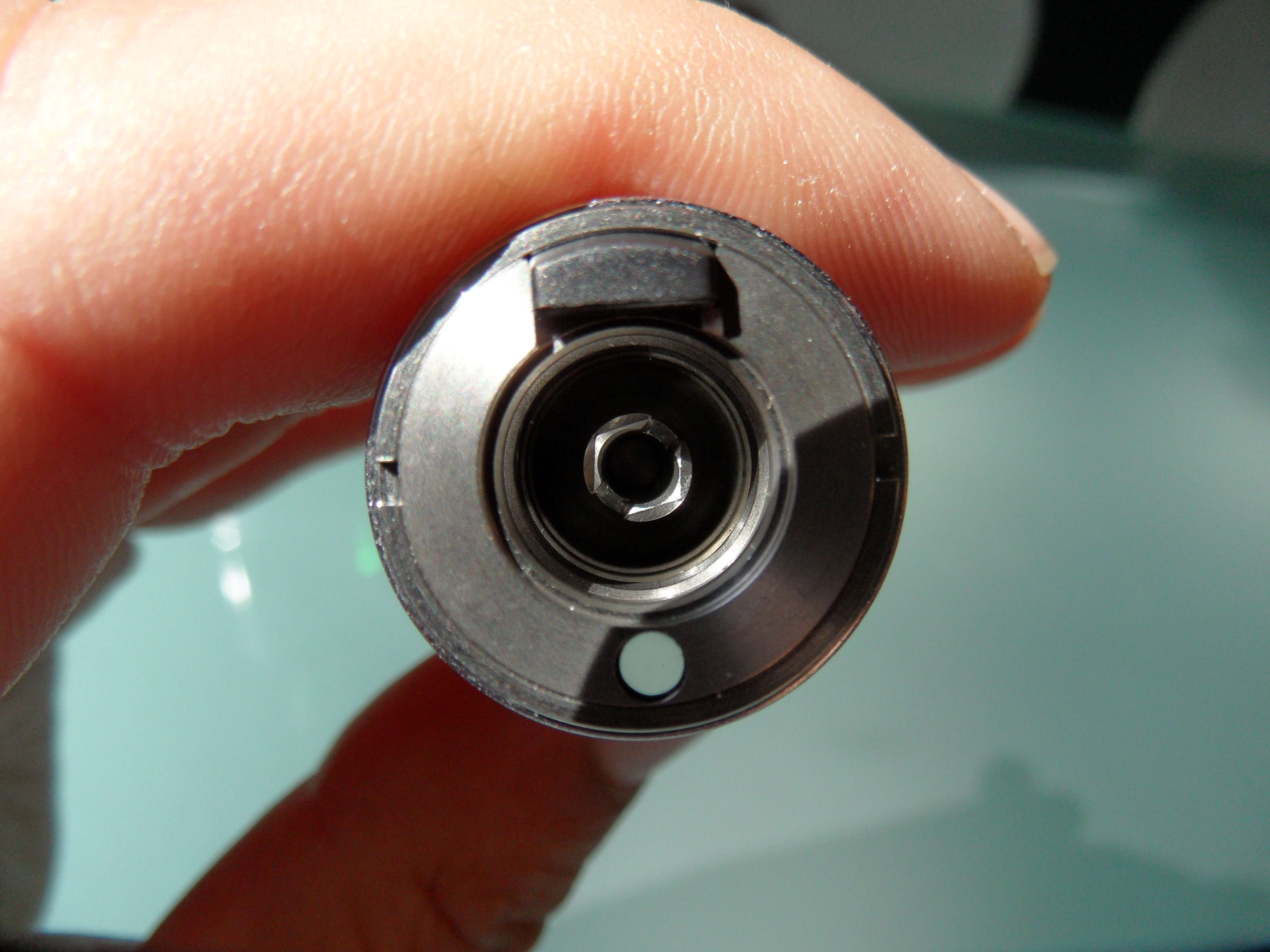 Dieses Bild zeigt den Teil des Winkelstückes, der auf den Mikromotor gesteckt wird. Deutlich zu sehen ist die Rastnase (oben), der Lichtleiter (unten) und das Übertragungsstück (mitte). Bei diesem Winkelstück handelt es sich um einen ISO-Anschluss.